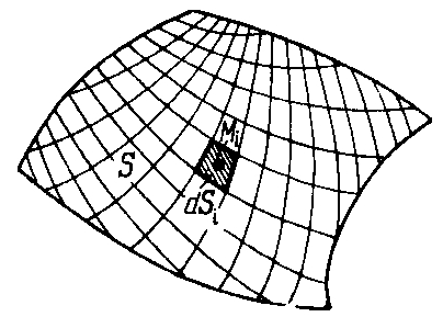 Surface integral